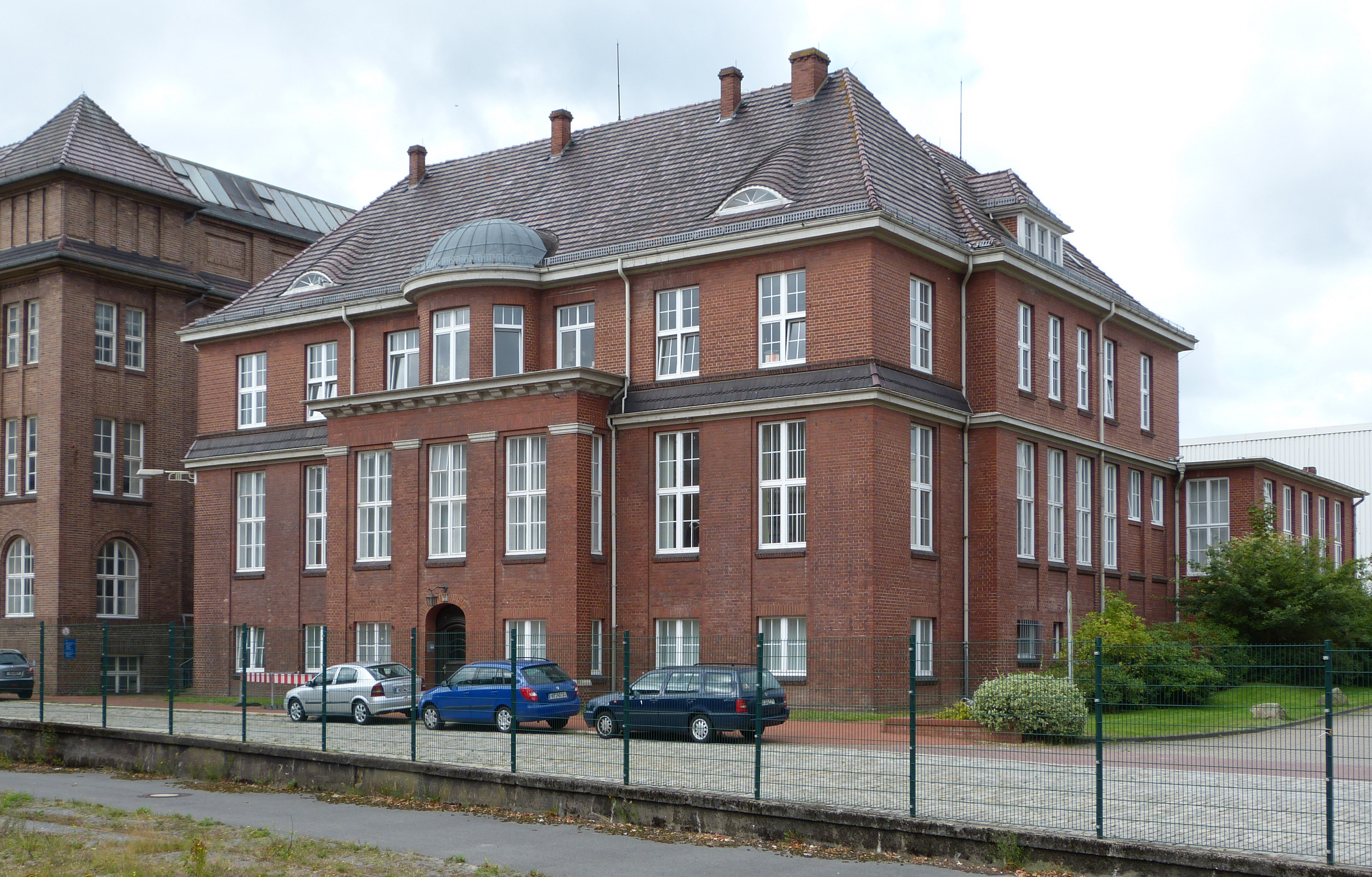 Bremer Wollkämmerei, Haus 50, Technische Verwaltung in Bremen, Landrat-Christians-Straße 95Das abgebildete Objekt ist ein geschütztes Kulturdenkmal in der Freien Hansestadt Bremen, mit der Nr. 2004 beim Landesamt für Denkmalpflege registriert.